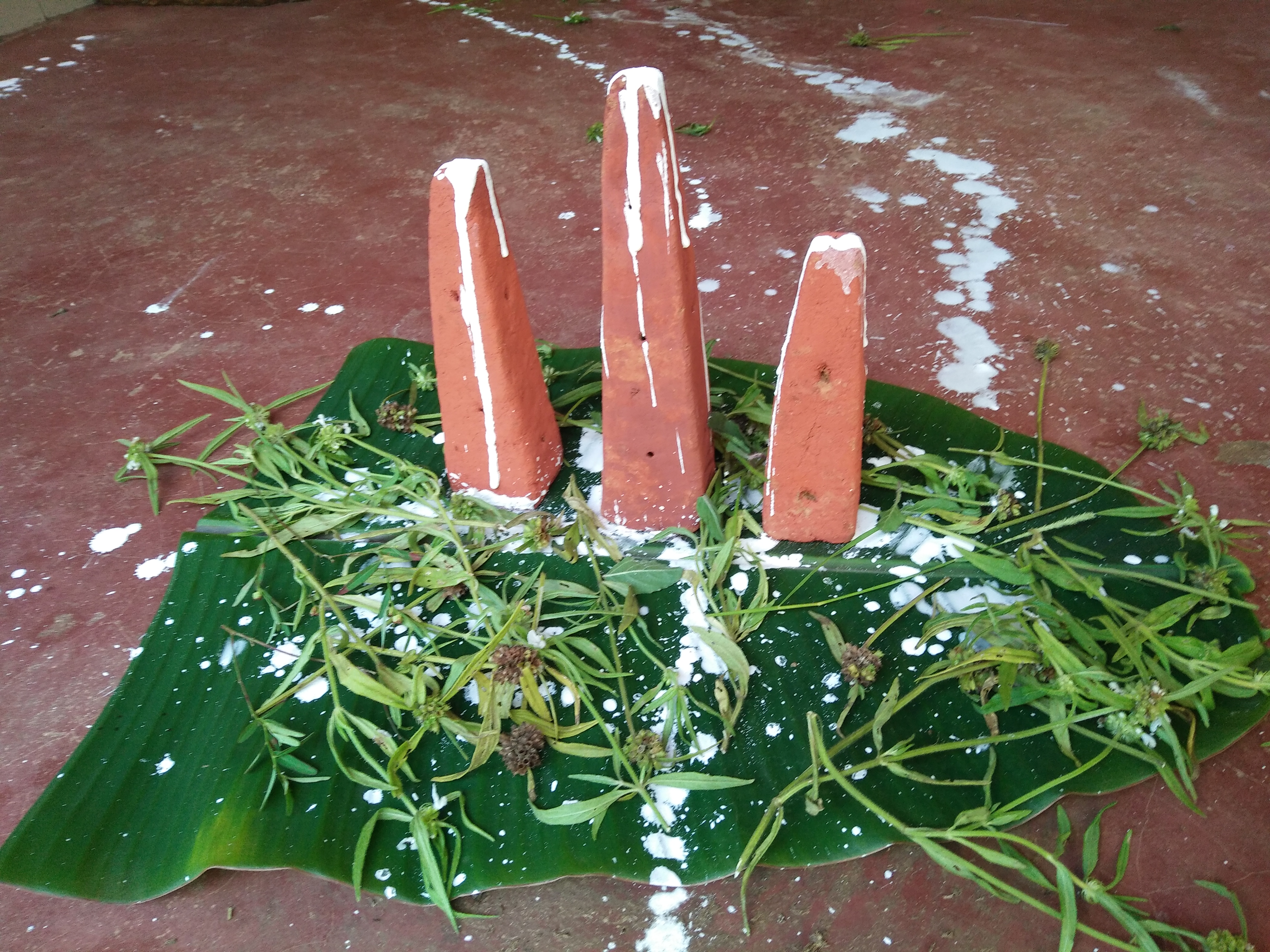 Onam thrikkakkarappan kerala